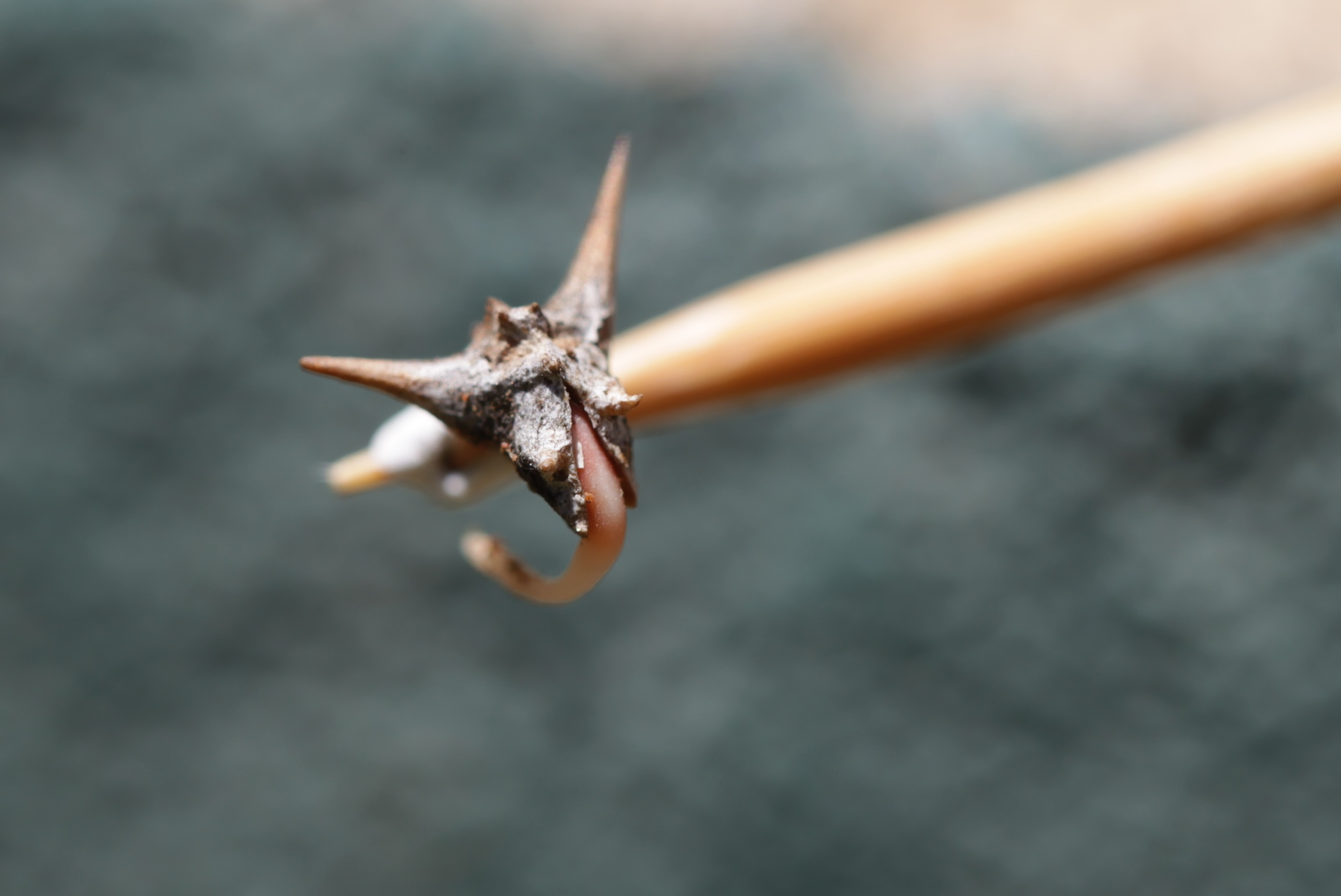 Tribulus Terrestris wat ontkiem